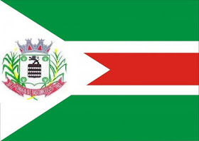 Bandeira da Cidade de Diogo De Vasconcelos